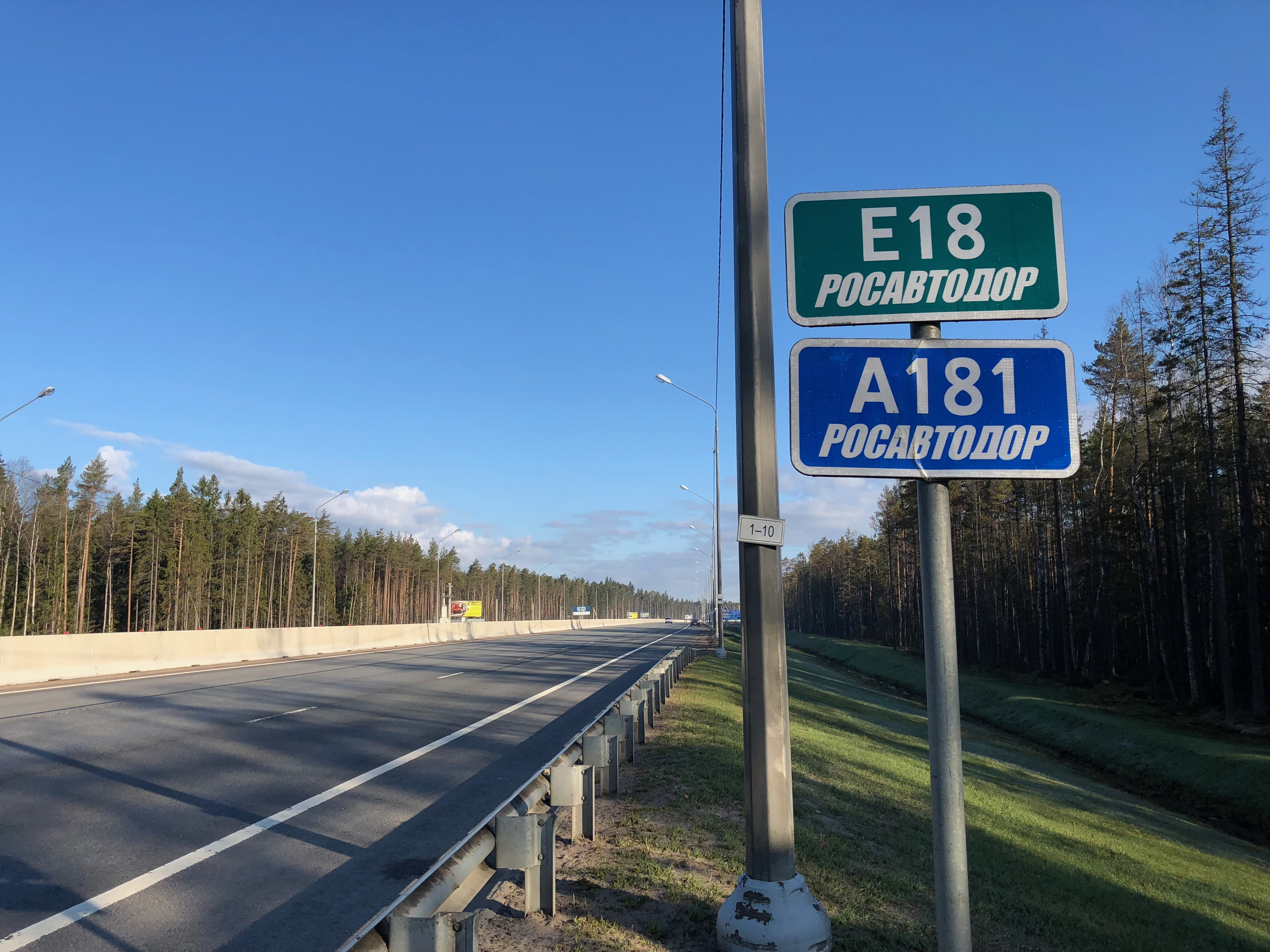 Конечная точка трассы Е18